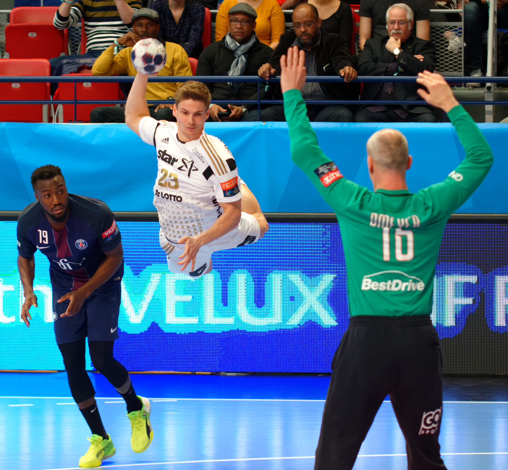 Rencontre de phase de groupe de la ligue des champions 2016-17 entre le PSG et le THW Kiel. A Coubertin, le 12 mars 2017.